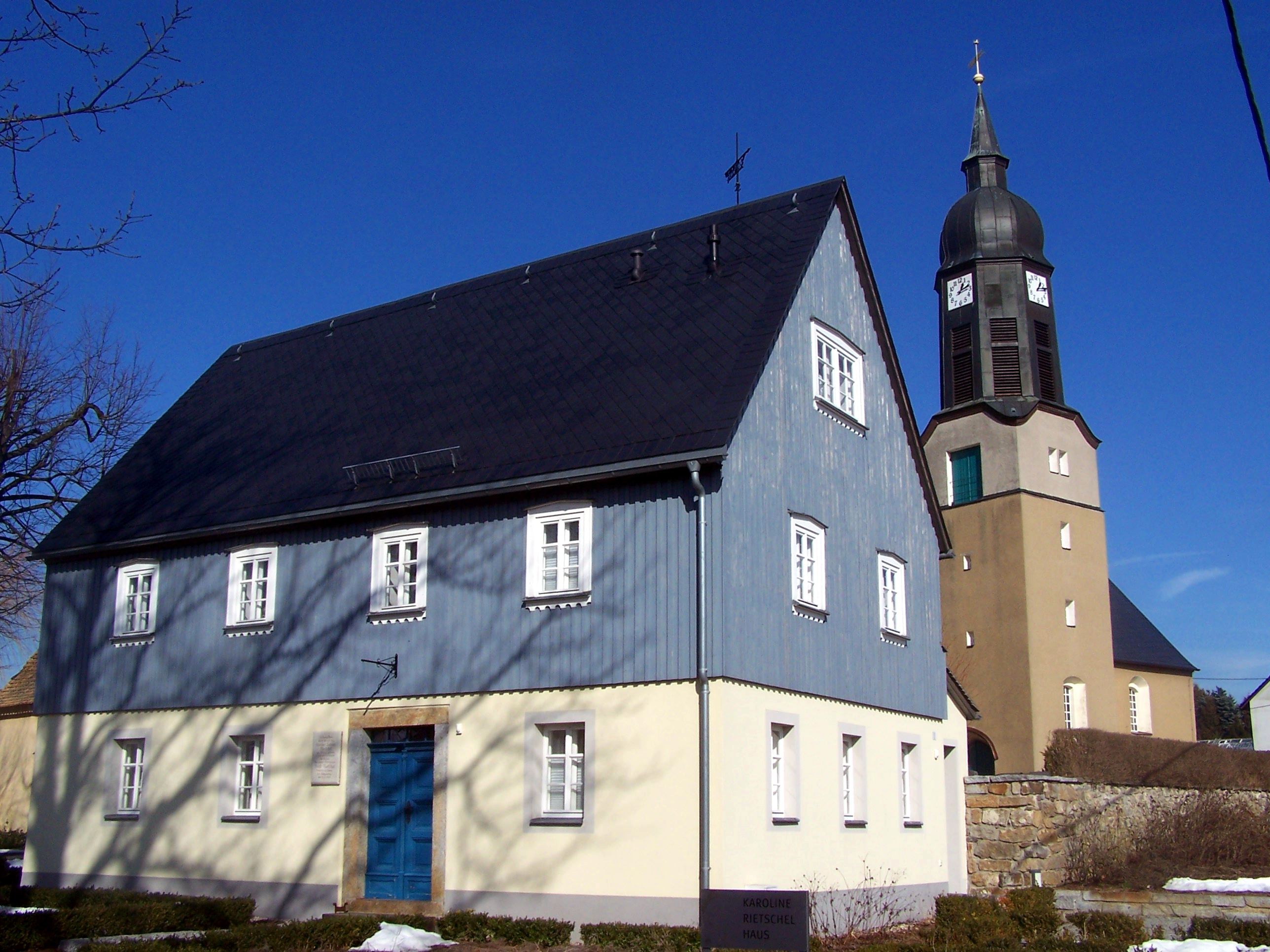 Gersdorf (Haselbachtal), Ensemble Kirche und Geburtshaus von Karoline Salome Rietschel, der Mutter des Bildhauers Ernst Rietschel